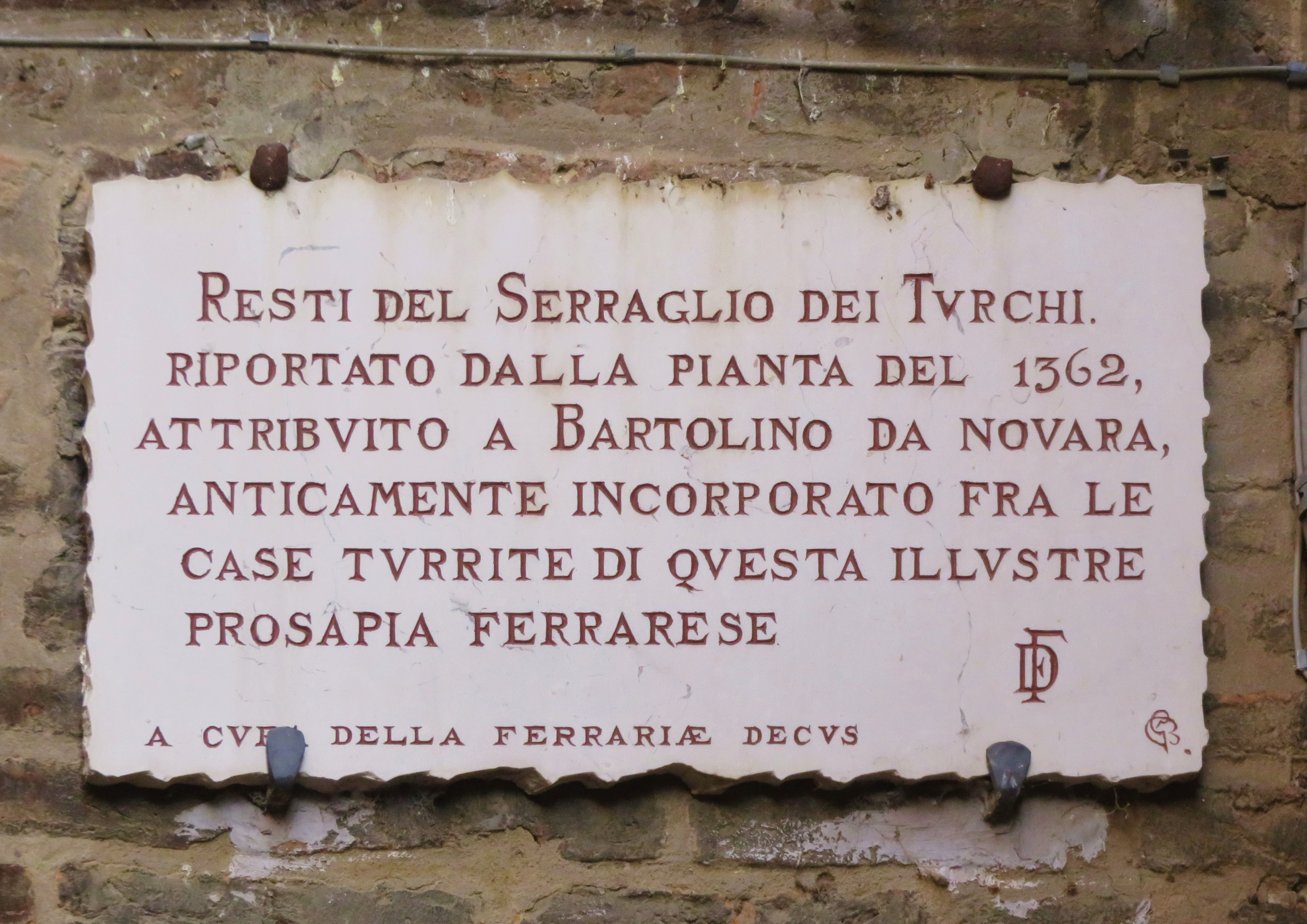 Volto su via Capo delle Volte (ancolo via del Turco) e resti dell'antica dimora della famiglia Turco o Del Turco, di Ferrara. XIV secolo. Attribuito a Bartolino da Novara, architetto del Castello Estense.